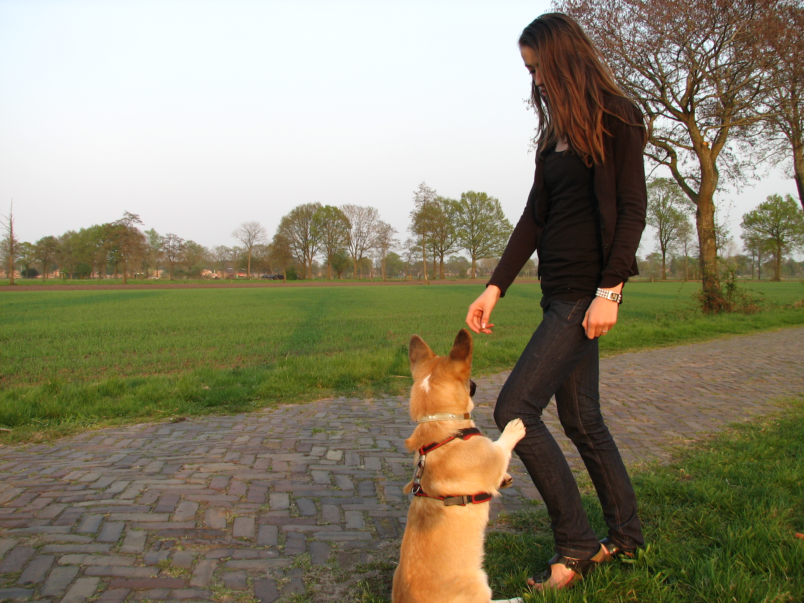 Dogdance